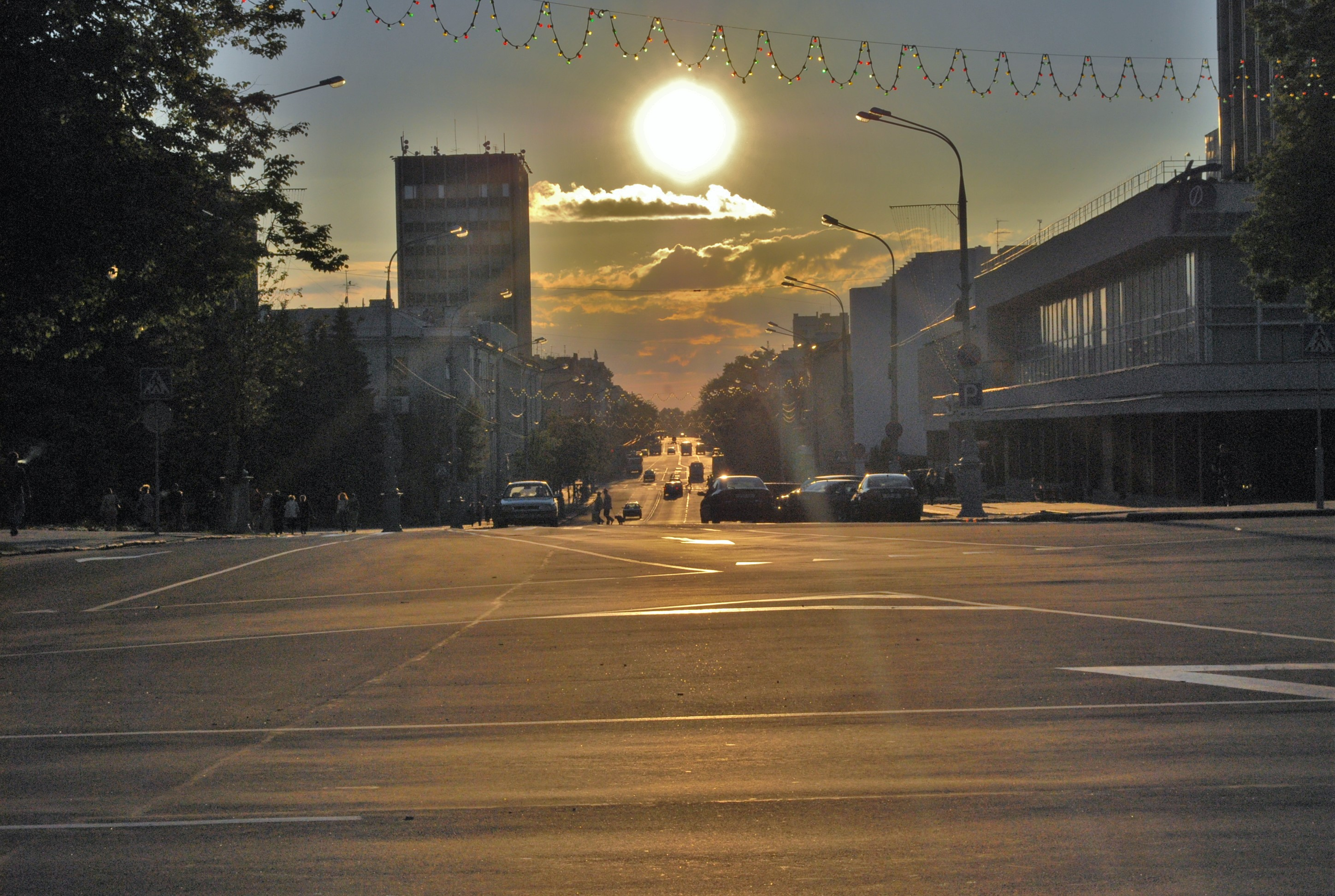 Проспект Ленина в г. Гомеле на закате